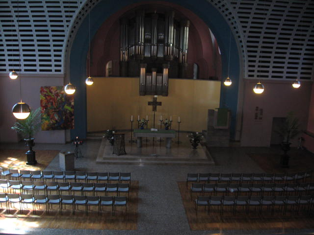 Altarraum der Friedenskirche von der Empore über dem Eingang aus fotografiert.